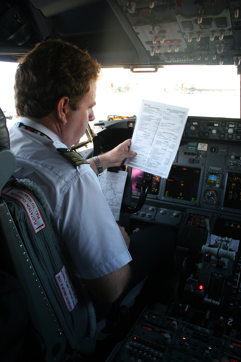 Parking checklist